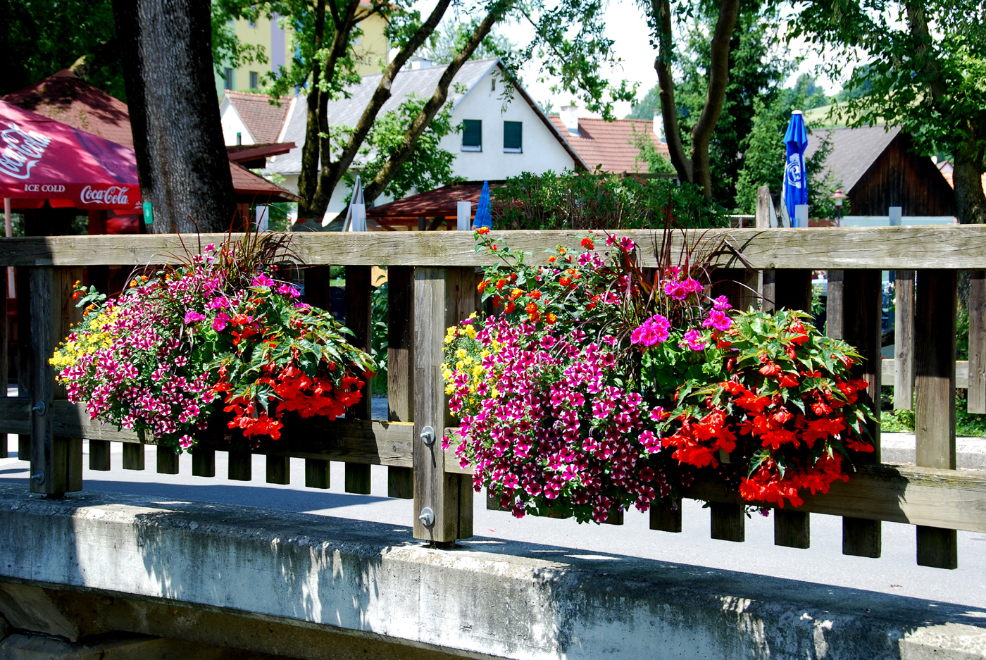 Unterlamm war schon mehrmals in den Siegerrängen beim Blumenschmuckwettbewerb in der Steiermark